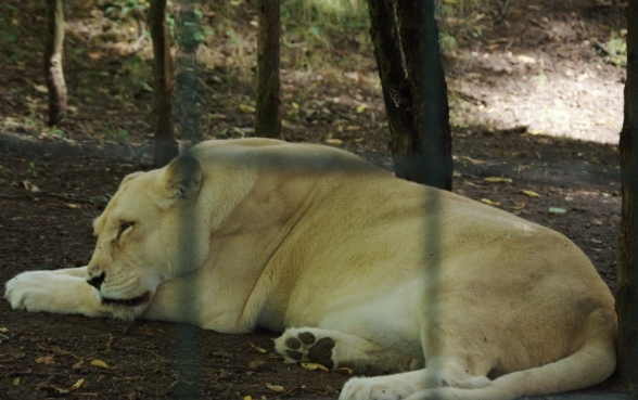 Zoo Parc Beauval